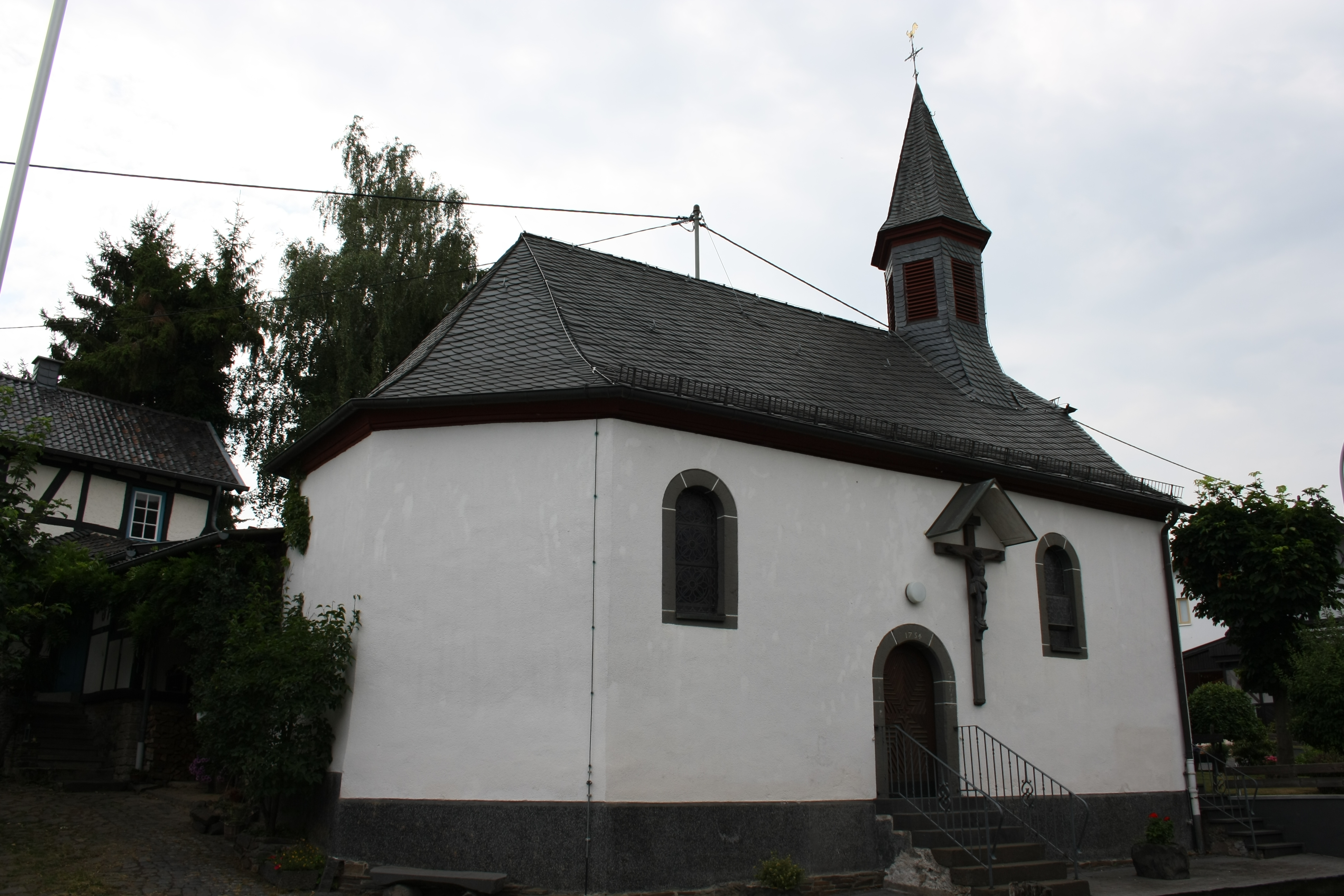 katholische Kirche St. Cornelius und Cyprianus in Oberdürenbach, bez. 1754